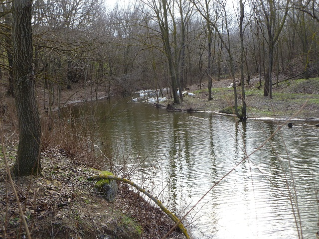 Пруд в яру на окраине Малых Ягур